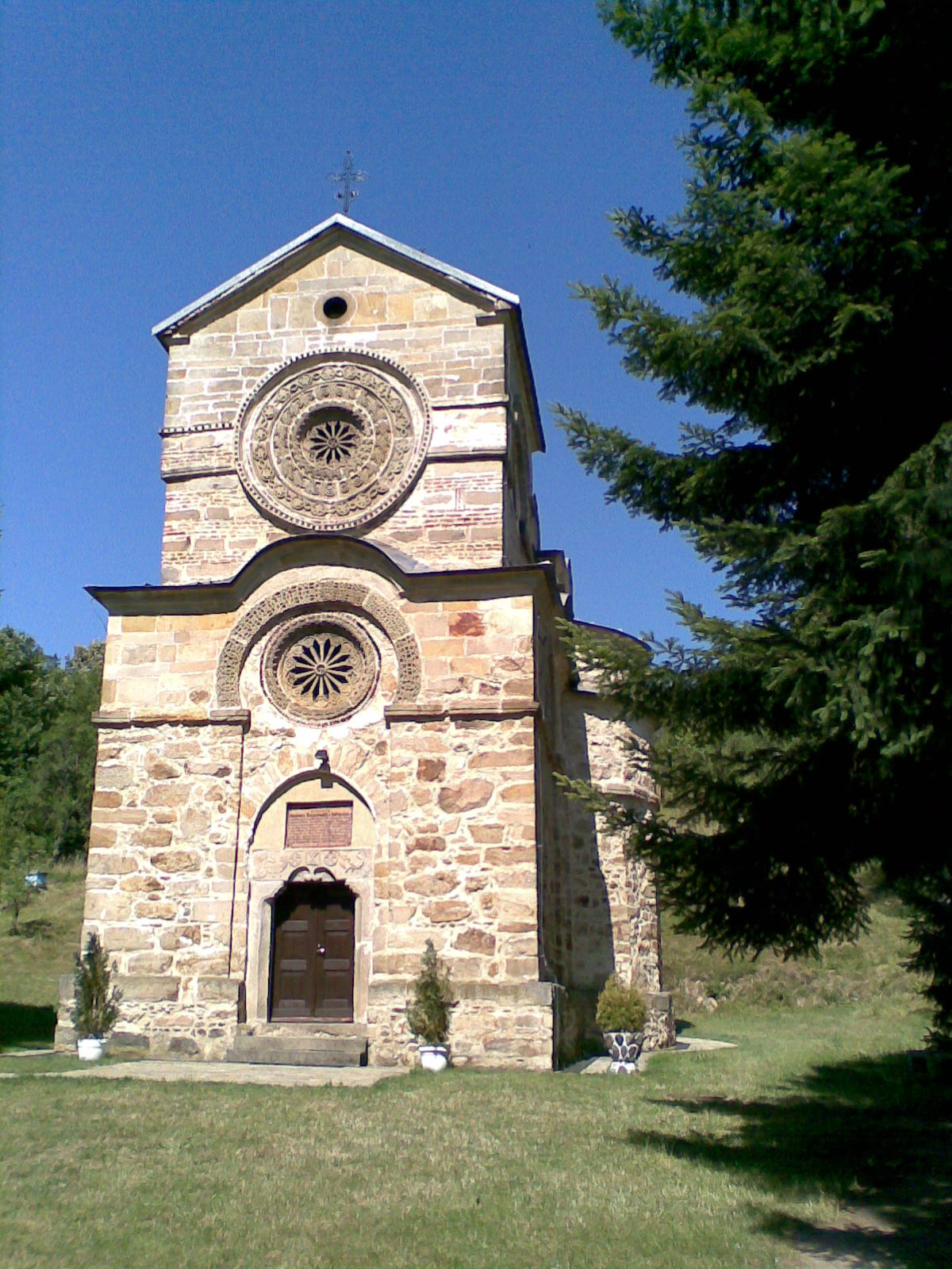 Манастир Наупара. Аутор снимка: Радосав Стојановић